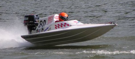 eigenes Foto